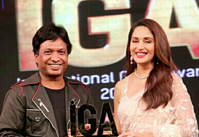 Madhuri Dixit dan Sunil Pal di International Glory Awards 2019